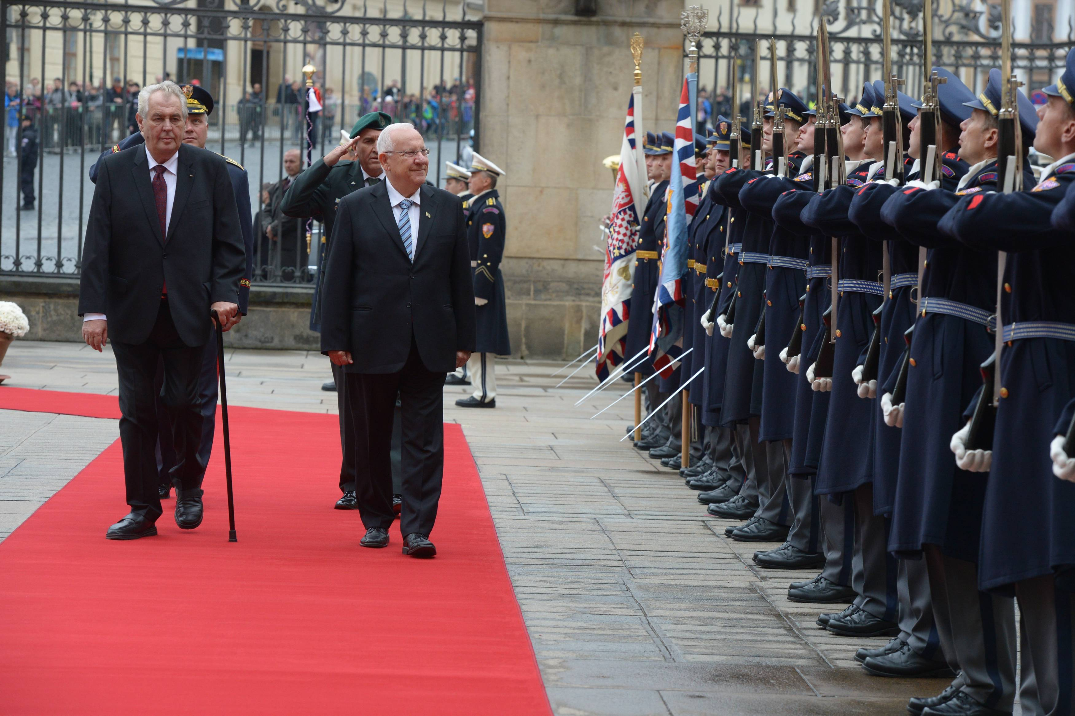 נשיא מדינת ישראל ראובן ריבלין בביקור רשמי בארמון הנשיאות של צ'כיה, מתקבל על ידי נשיא צ'כיה מילוש זמאן